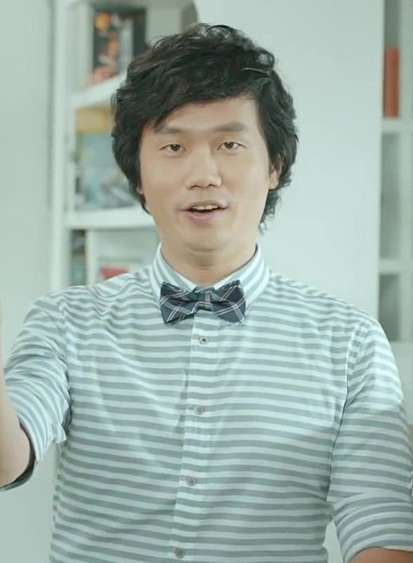 (착한 저작권 굿ⓒ 캠페인) 저작권 존중과 나눔, 모두가 행복해집니다.